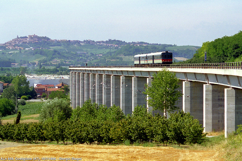 Il viadotto ferroviario di Costigliole, sulla linea Castagnole-Asti-Mortara.